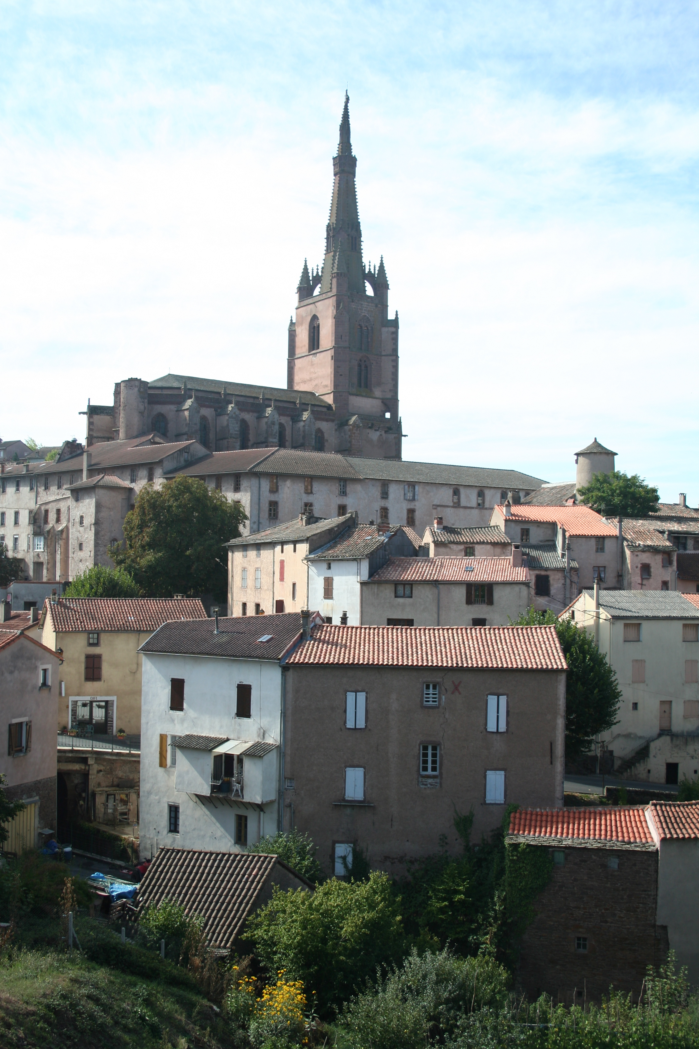 Belmont-sur-Rance (Aveyron) - vue générale du village dominé par la collégiale Notre-Dame-de-l'Assomption.